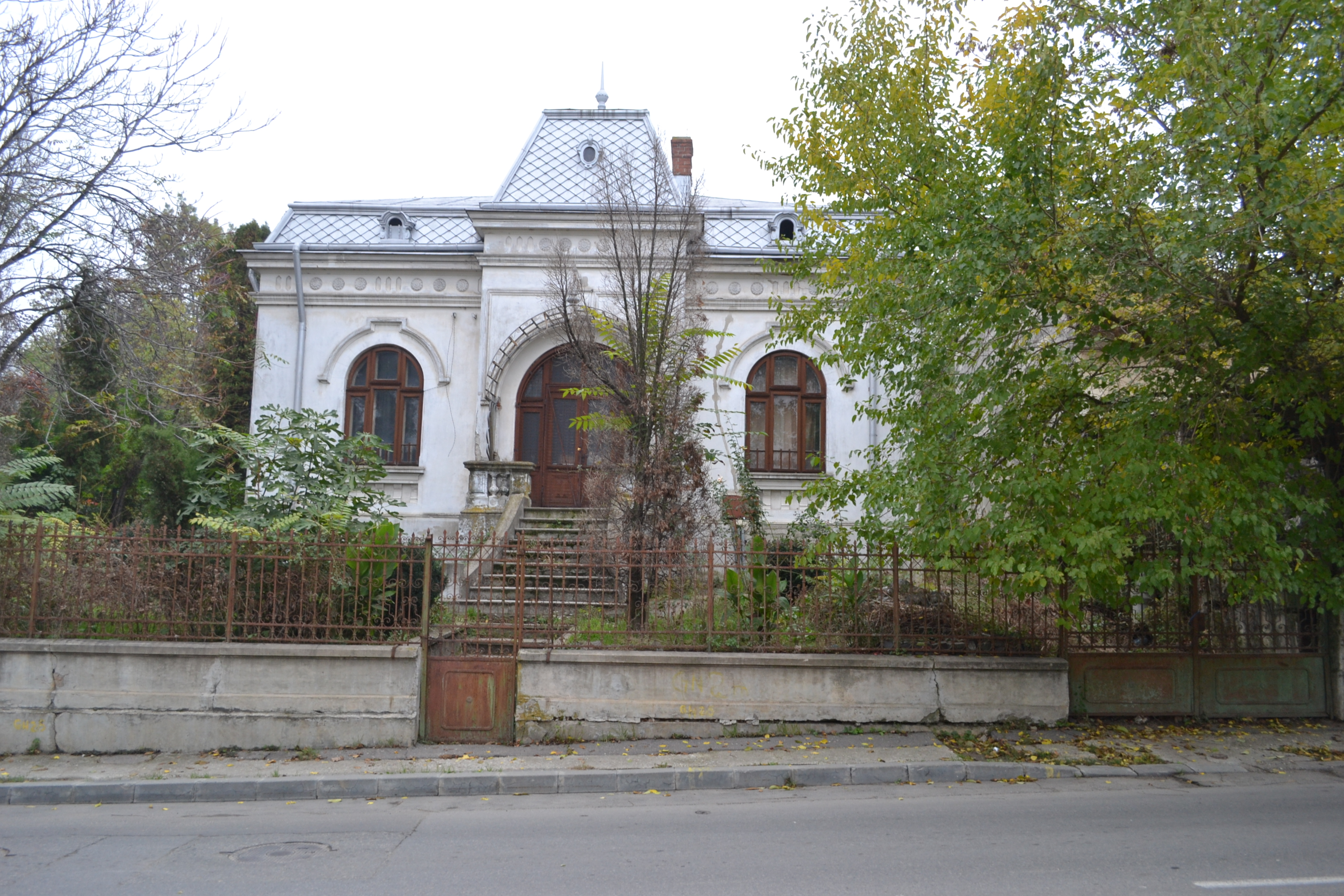 Casă din strada Vederii nr 5 Slatina